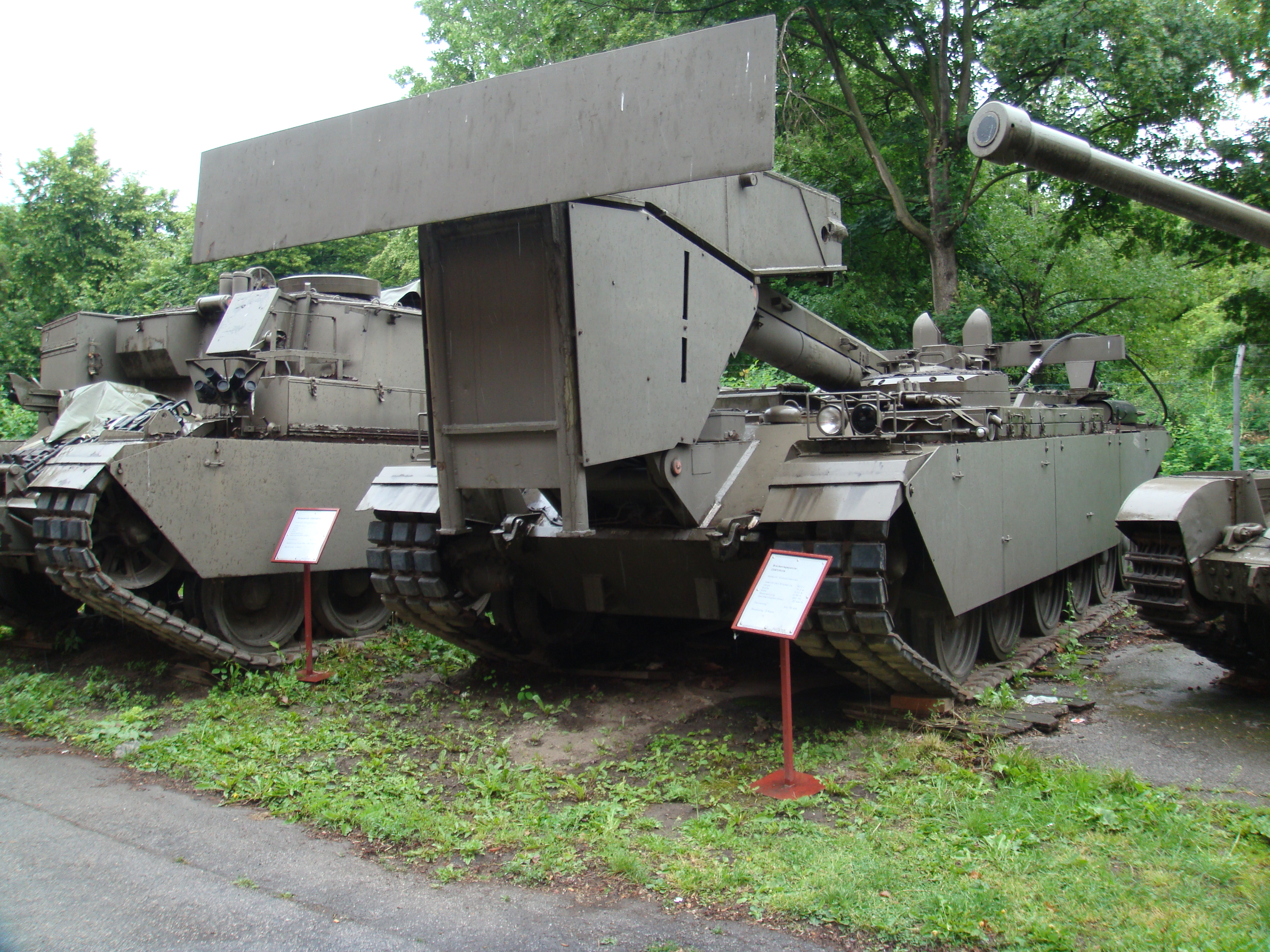 Centurion Brückenleger Heeresgeschichtliches Museum Native nameHeeresgeschichtliches MuseumParent institutionMinistry of DefenceLocationViennaCoordinates48° 11′ 07.3″ N, 16° 23′ 14.6″ E Established1856Web page control : Q700751 VIAF: 149726120 ISNI: 0000 0001 2182 8171 LCCN: n50055593 OSM: 4465113 GND: 2006452-4 WorldCat institution QS:P195,Q700751